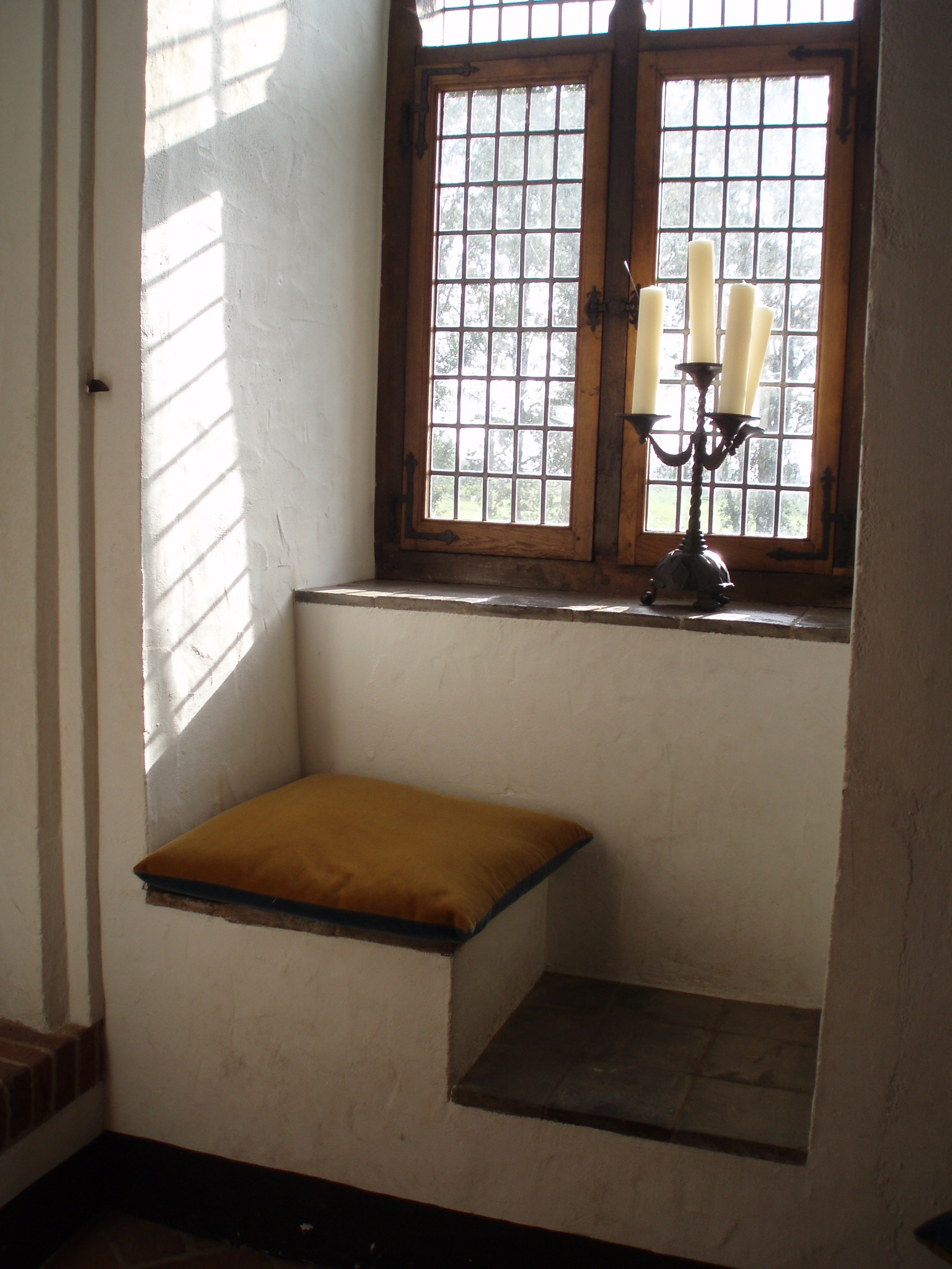 eigen foto (c) looi 2006 vensterbank in kasteel Doorwerth